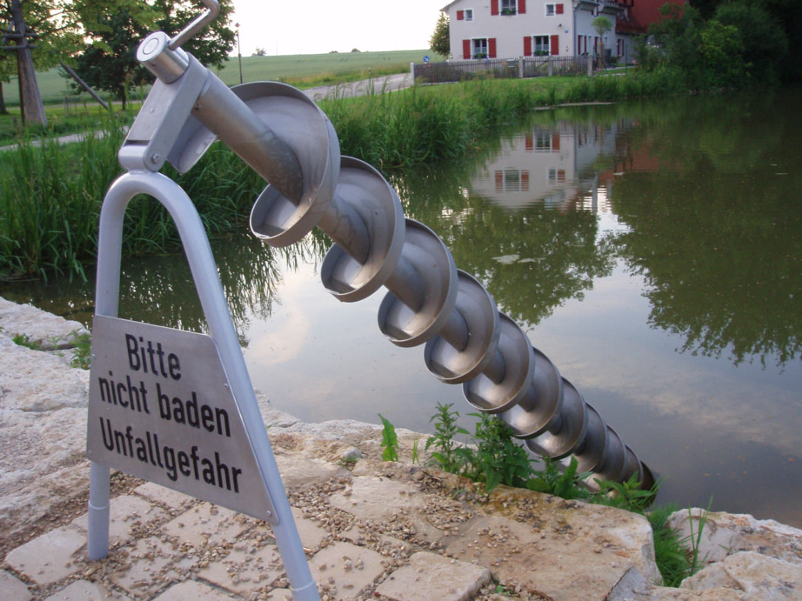 Archimedesschraube an der Fossa Carolina